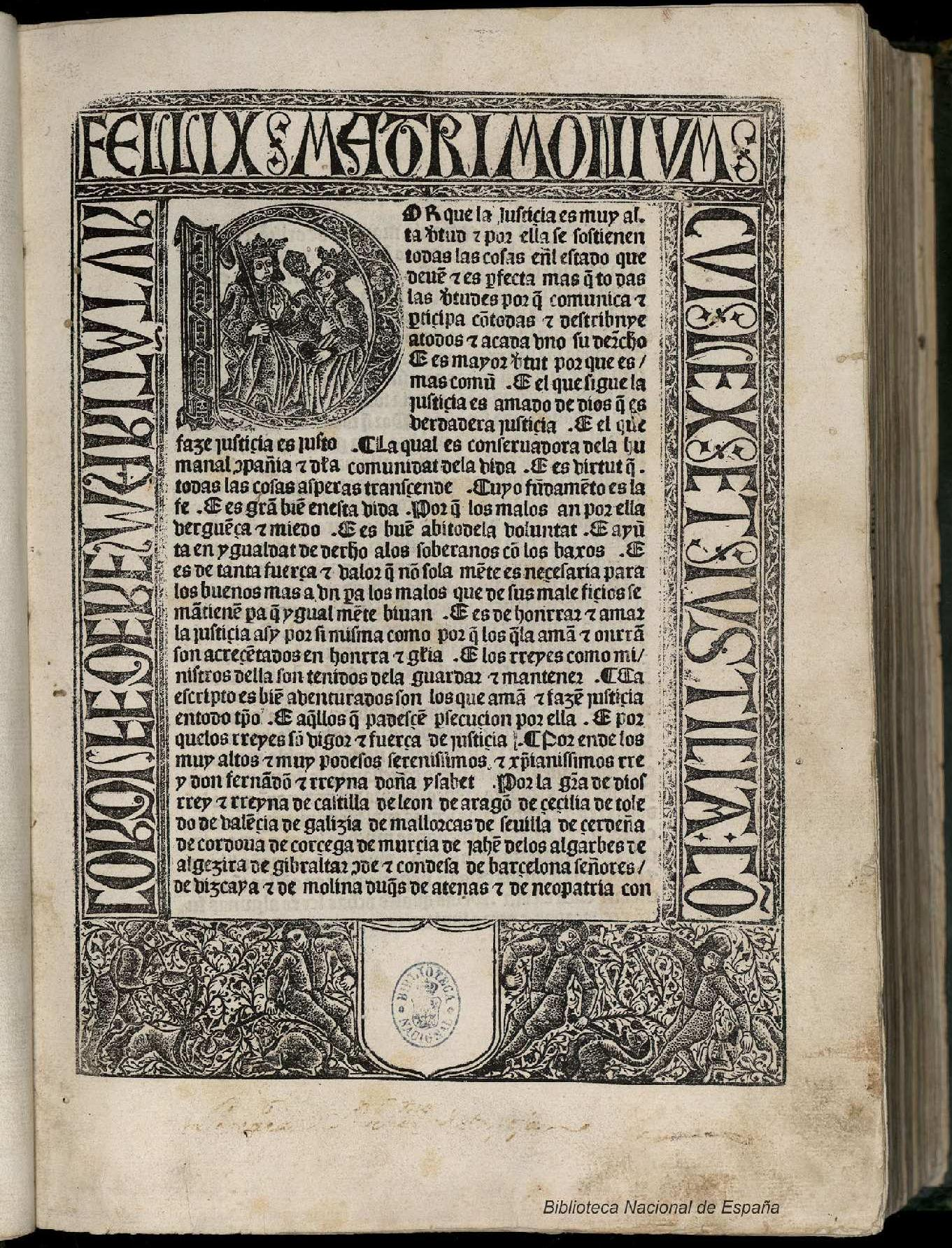 Ordenanzas reales de Castilla Autor: Díaz de Montalvo, Alfonso (1405-1499) Fecha: 1485 Datos de edición: En la cibdad de huepte [Alvaro de] Castro